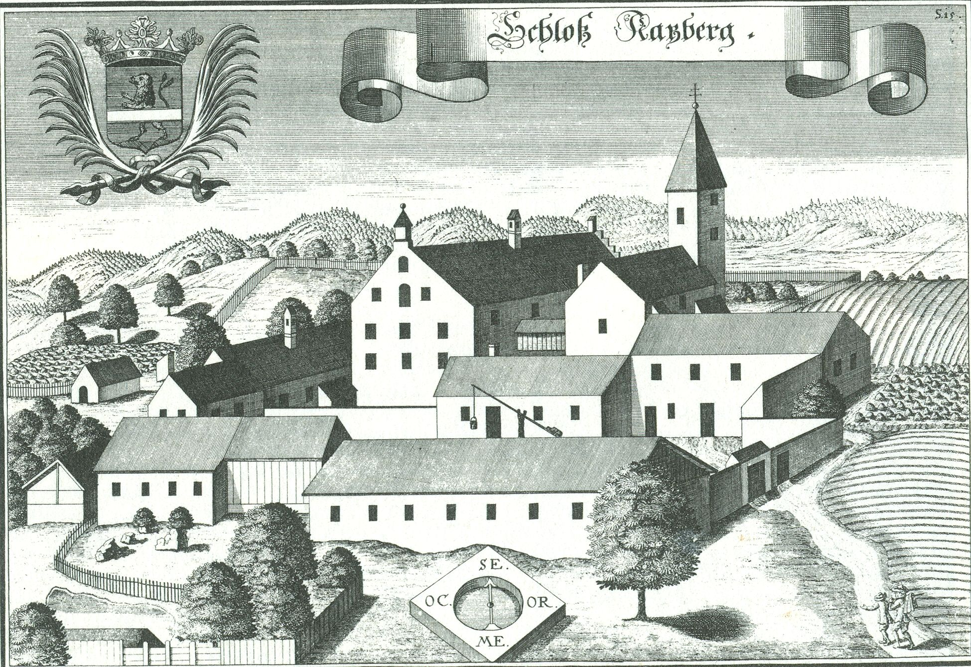 Schlos Katzberg